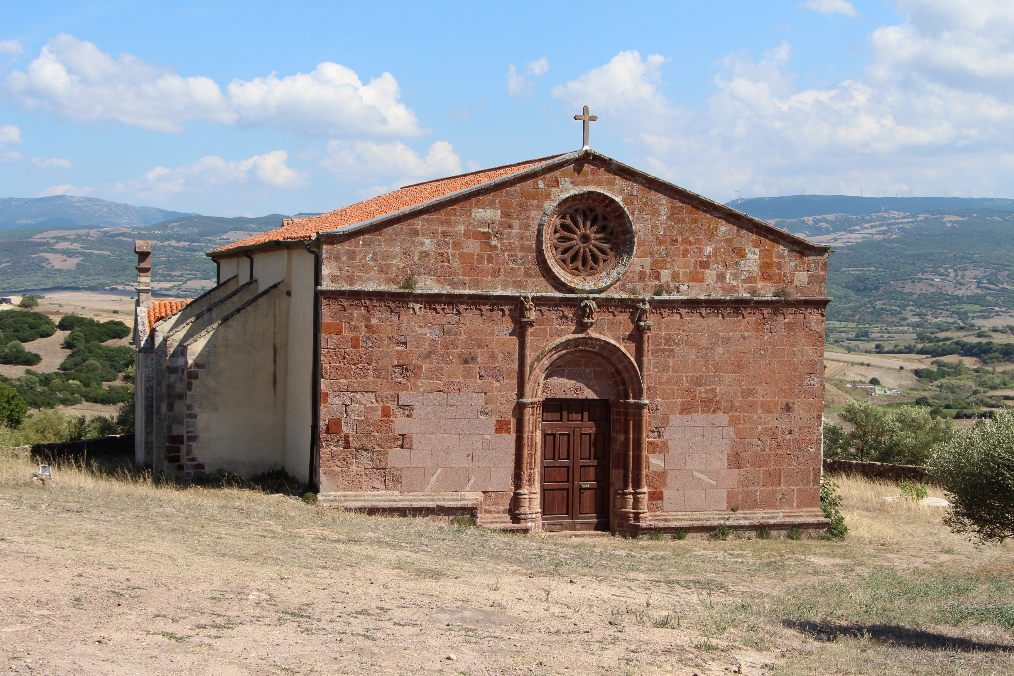 Perfugas